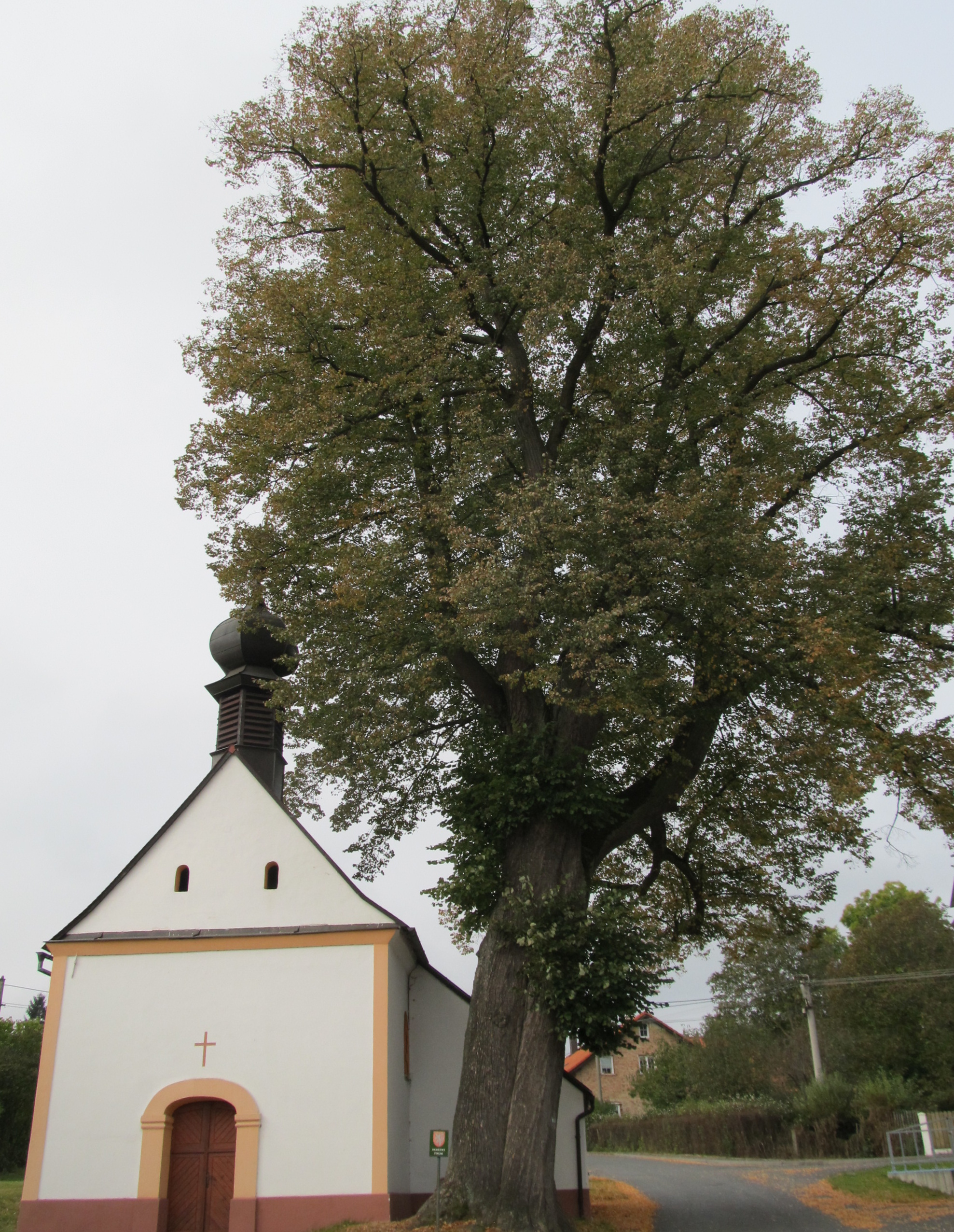 Chudenín - památná lípa